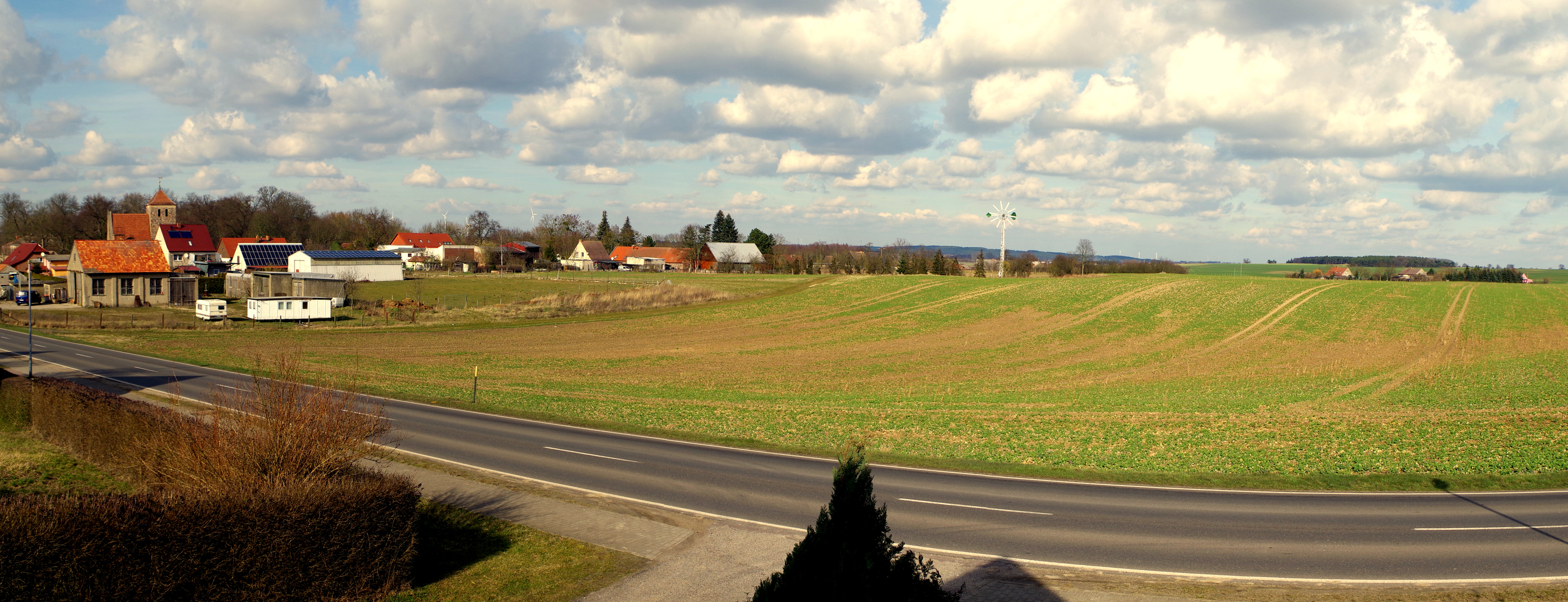 Wolken über Grünow